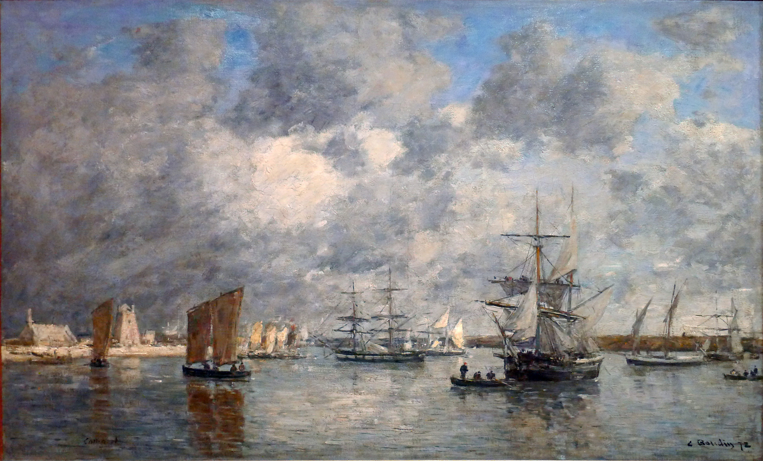 Port de Camarettitle QS:P1476,fr:"Port de Camaret" label QS:Lfr,"Port de Camaret"